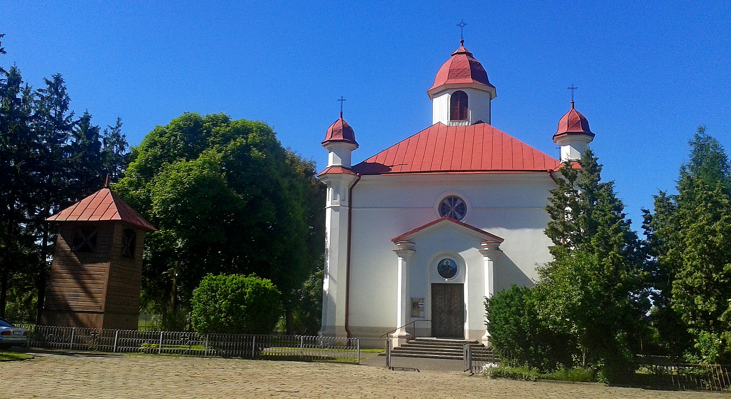 Kościół, dawniej cerkiew, w Klonownicy Dużej